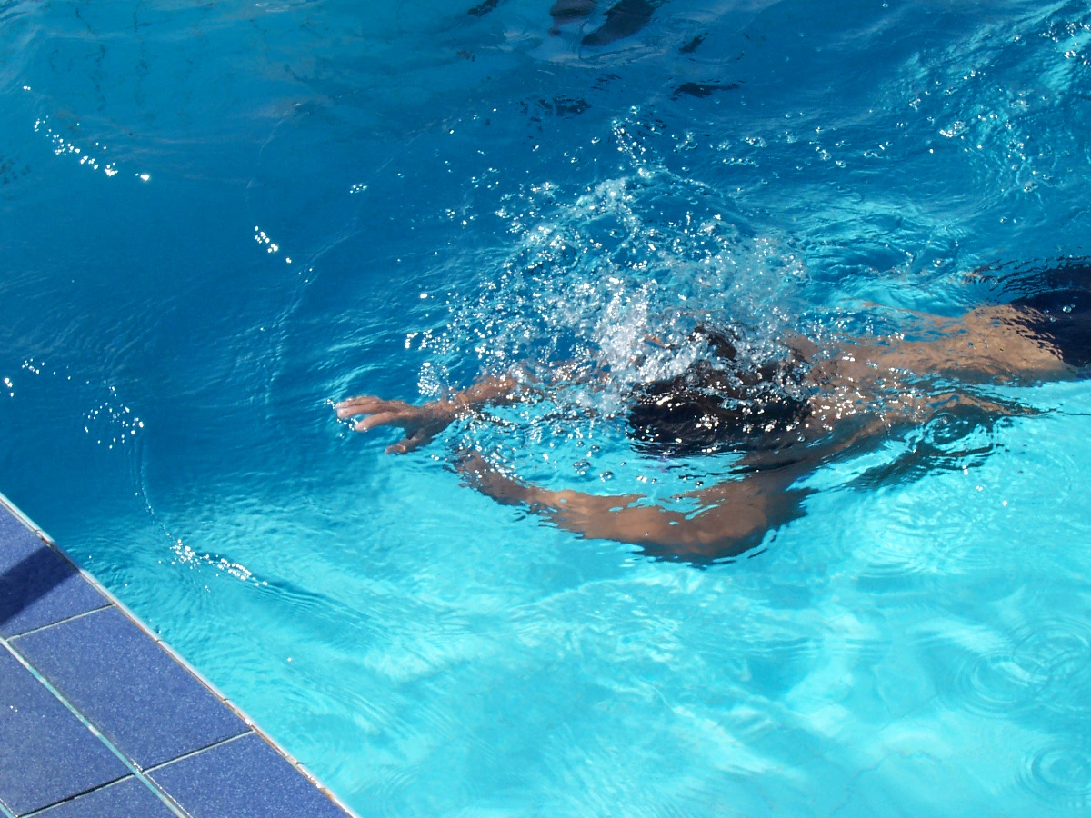 swimming (ว่ายน้ำ) - Tak, Thailand